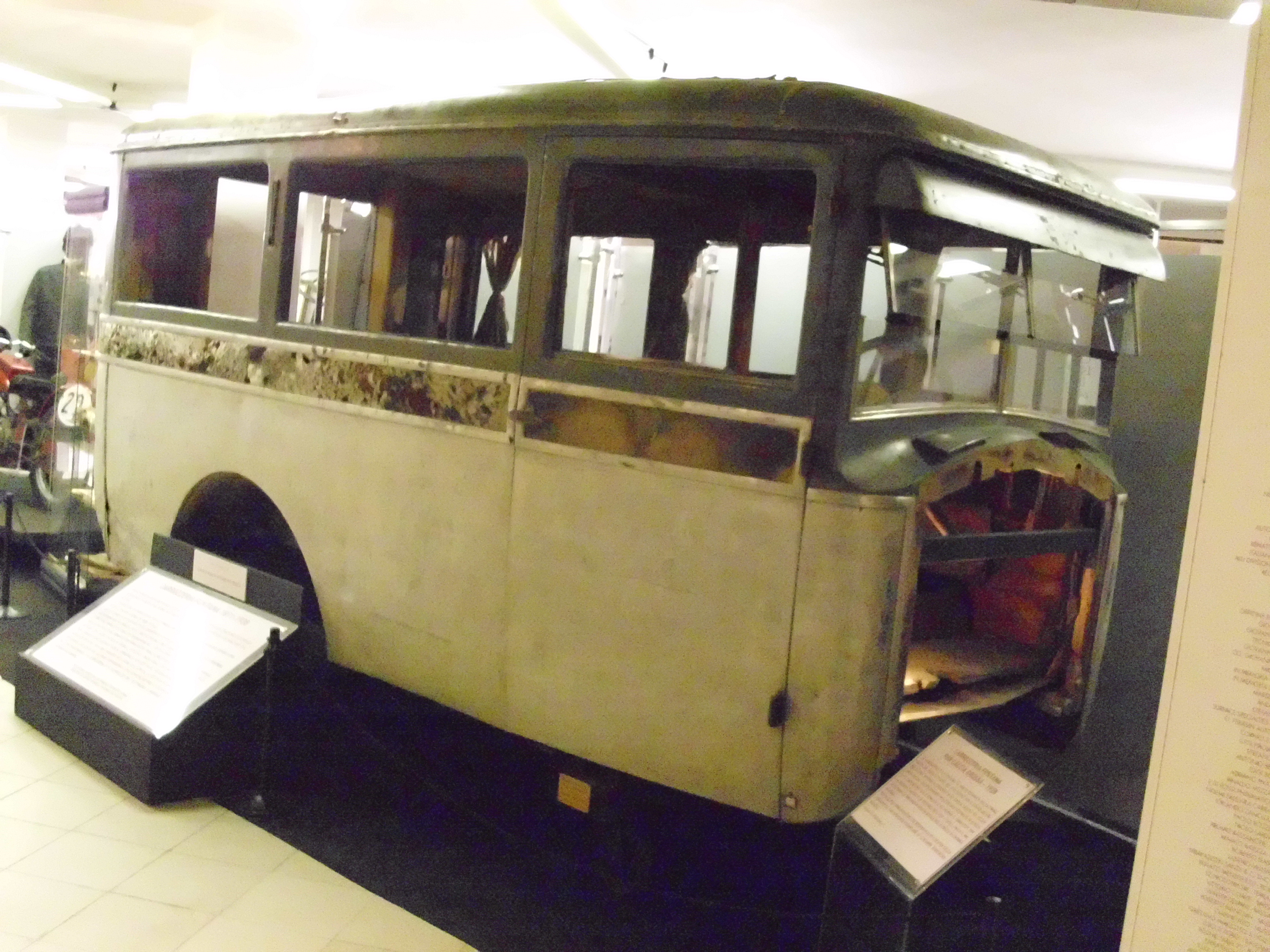 Kleinbus-Karosserie von der Carrozzeria Baldassarre Fontana